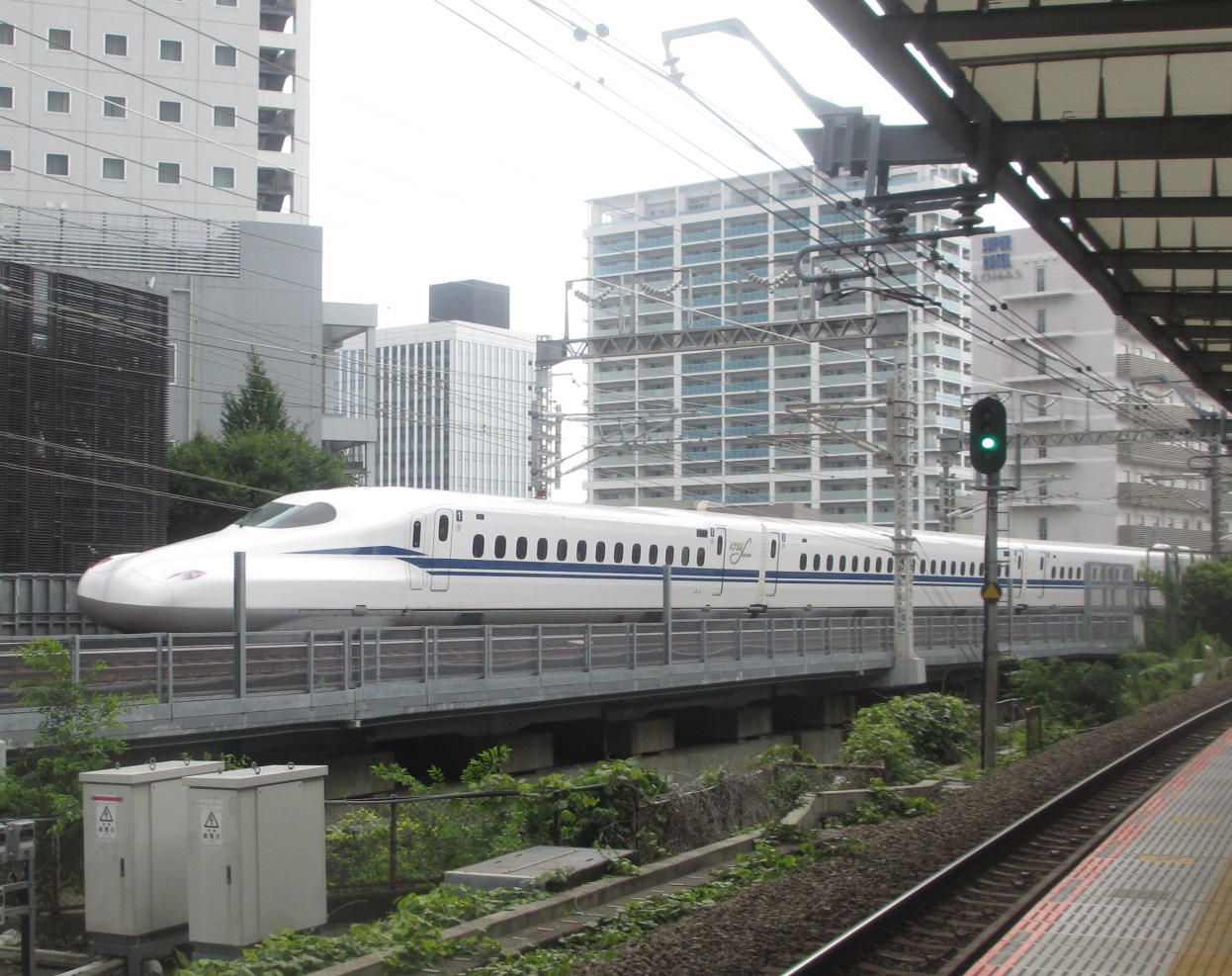 武蔵小杉駅を通過するN700S量産車（最後尾から撮影）